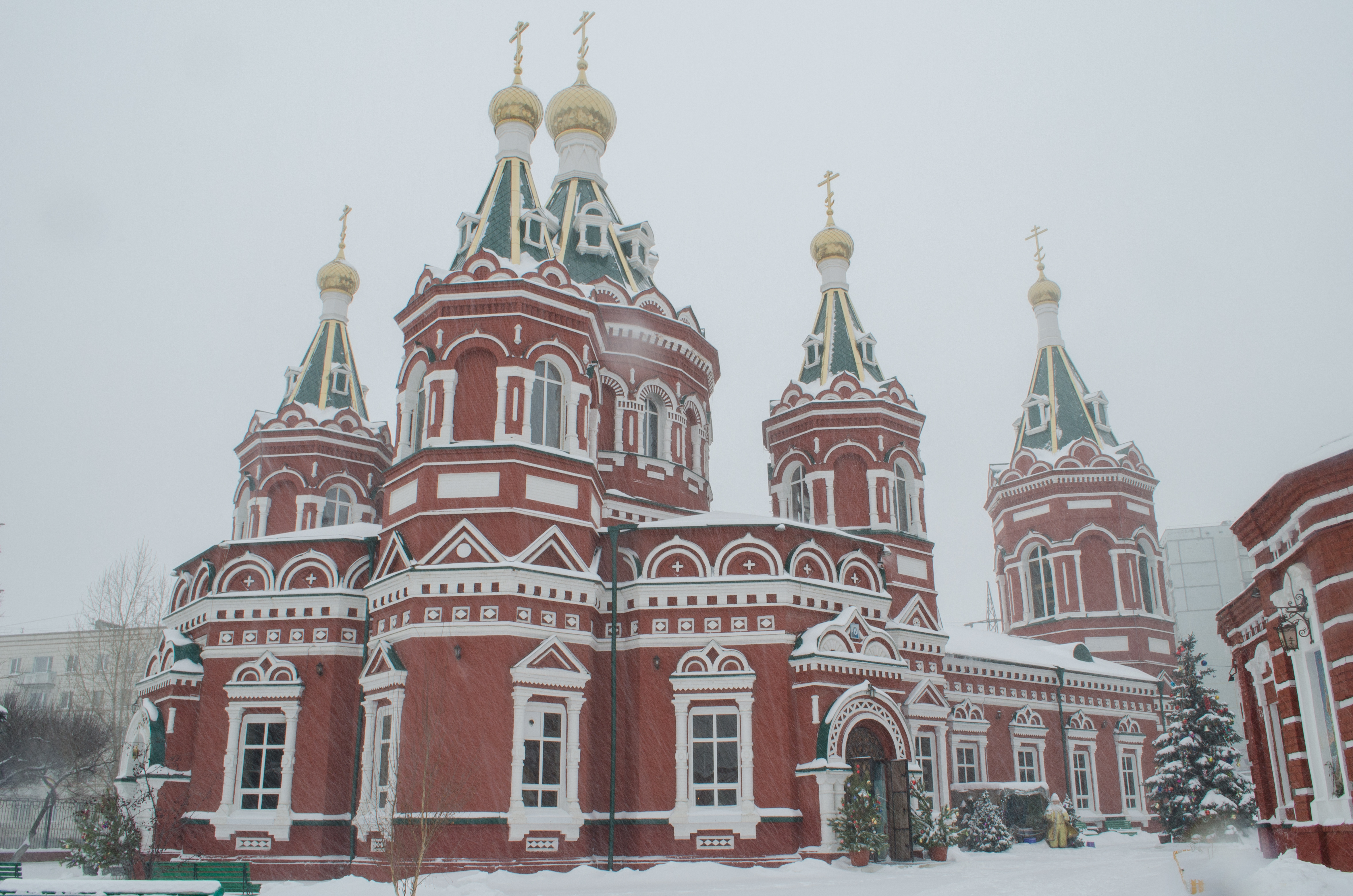 Липецкая, 10.